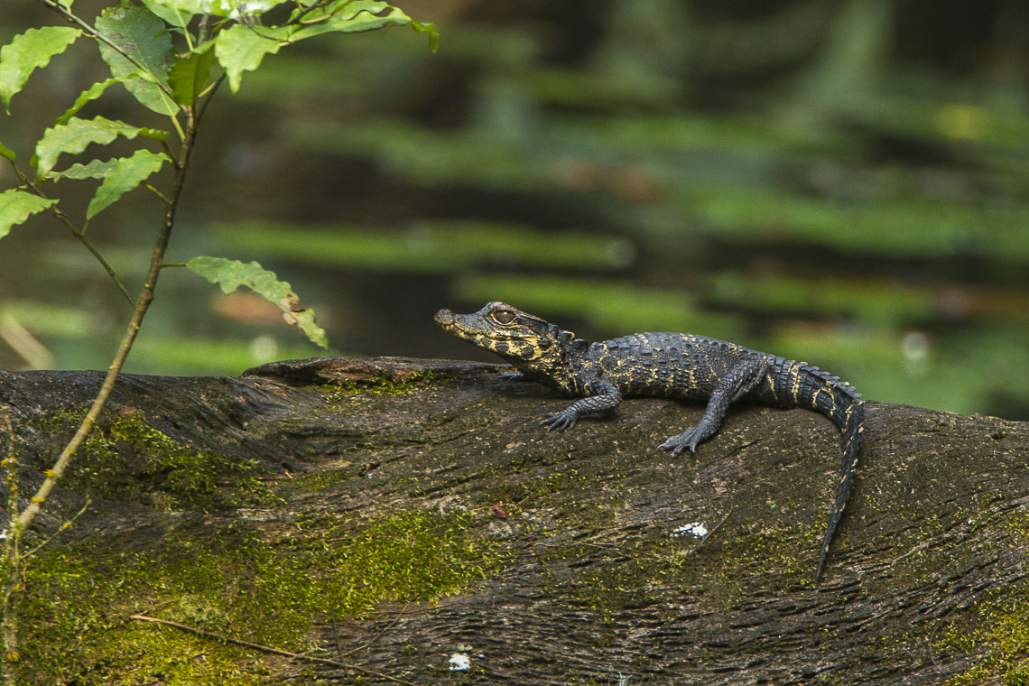 Dwarf Crocodile juv - Ankasa - Ghana 14_S4E1975